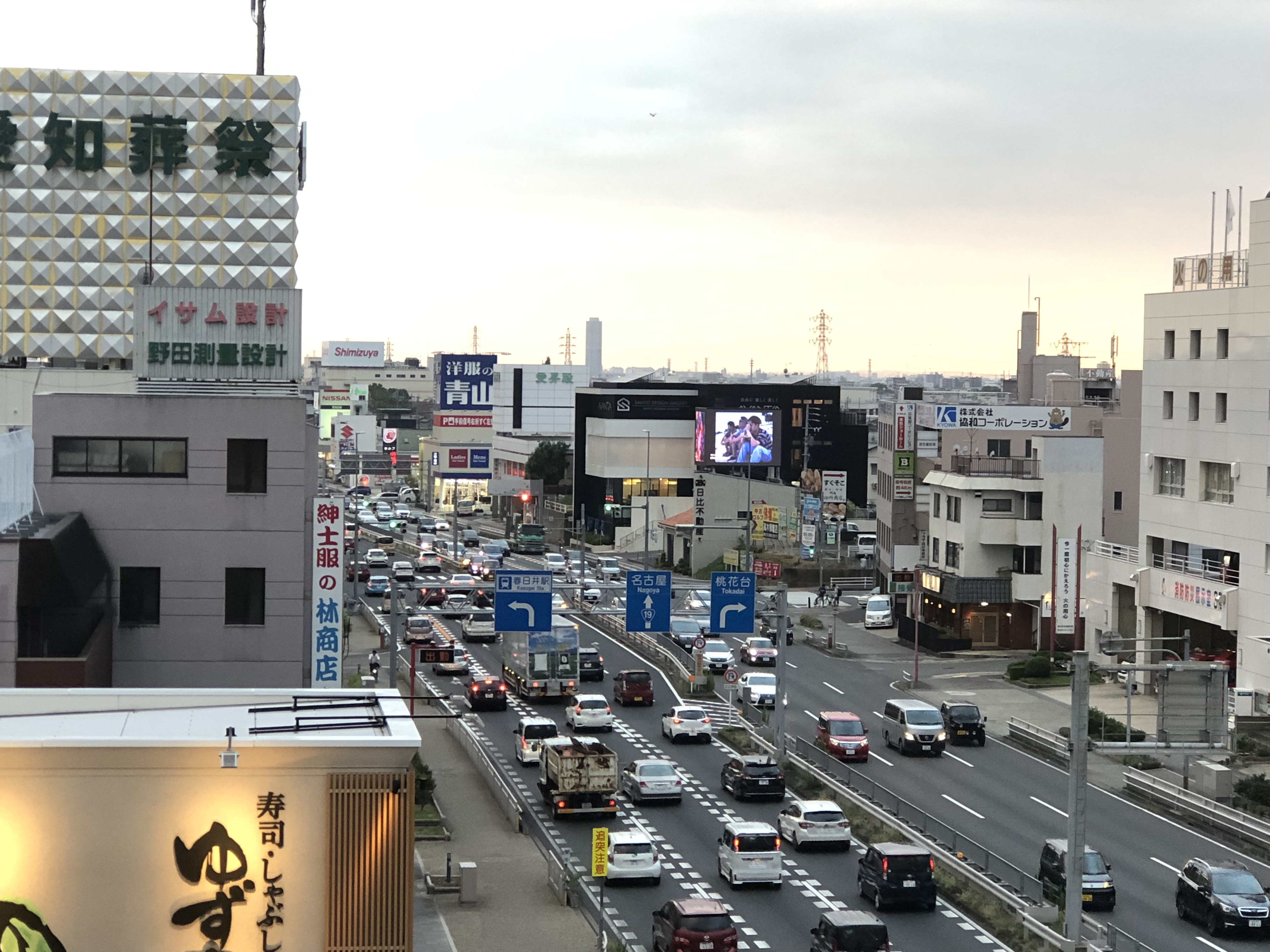 国道19号線と春日井市街